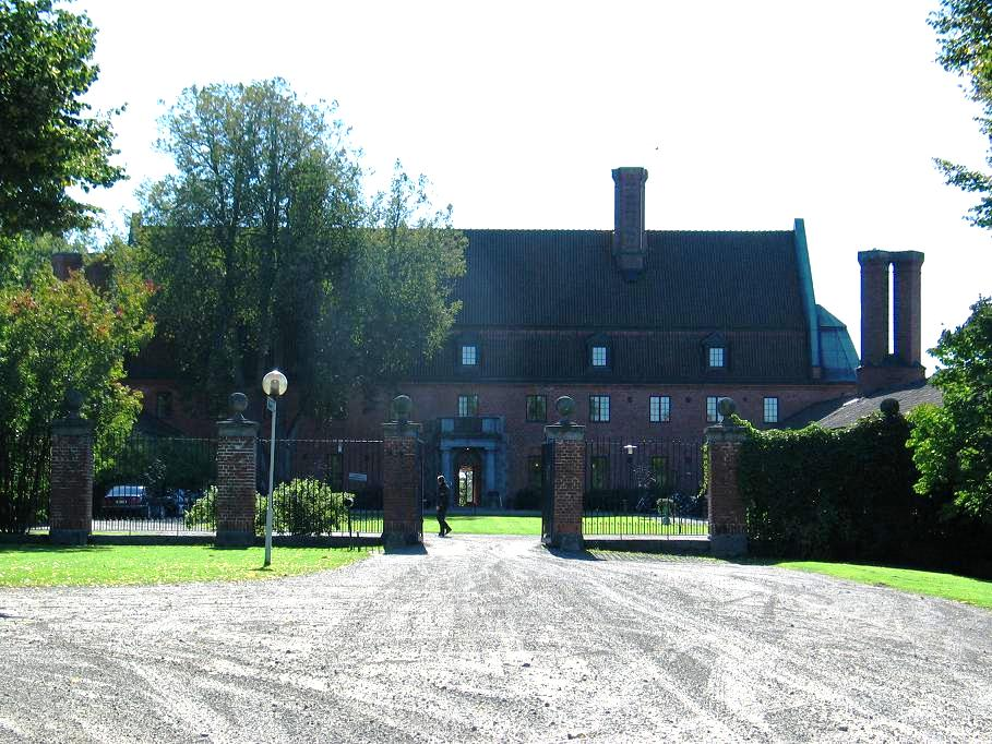 Vanajanlinna, Hämeenlinna